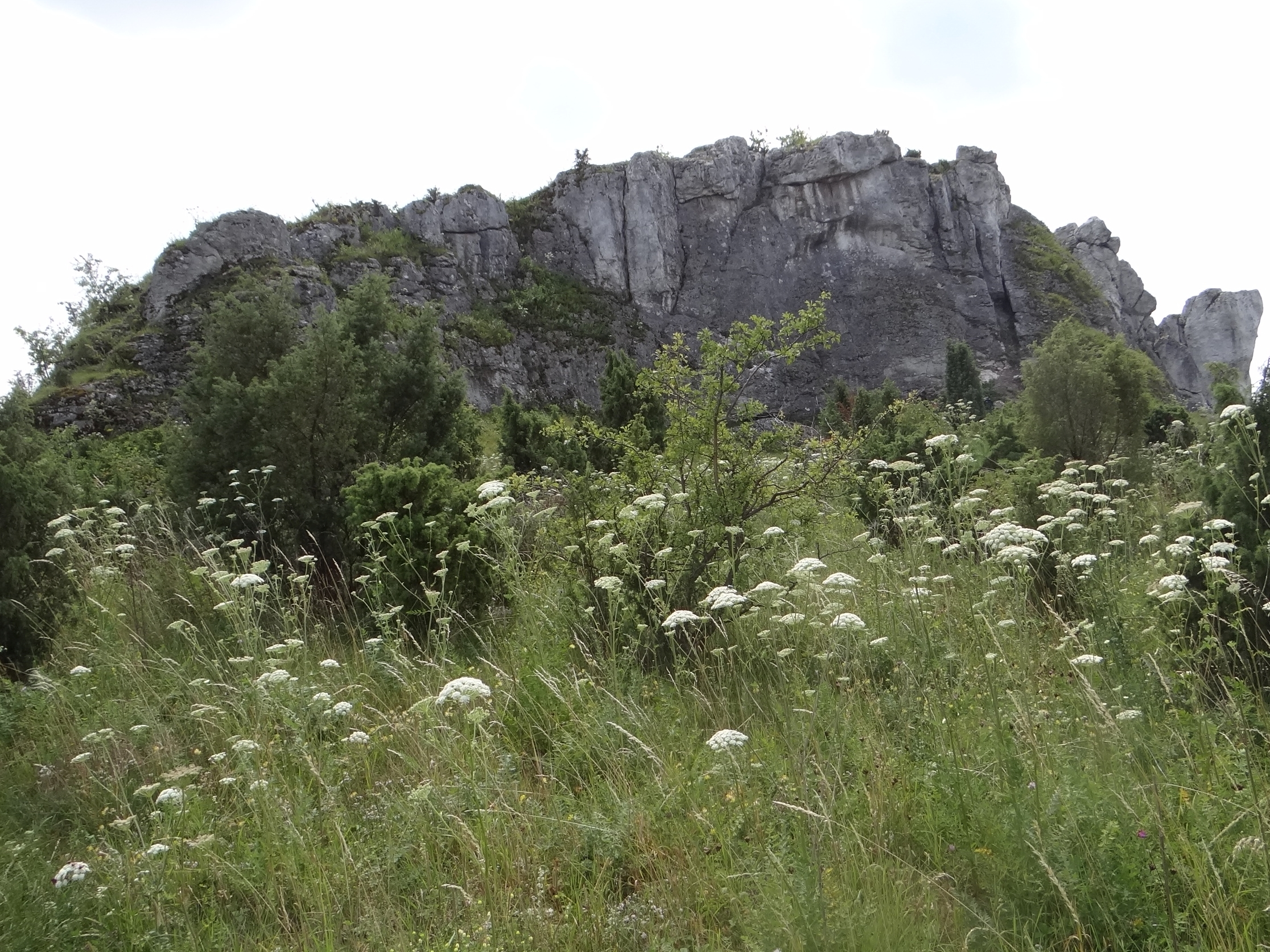 Owczy Mur w Grupie Dziewicy koło Olsztyna